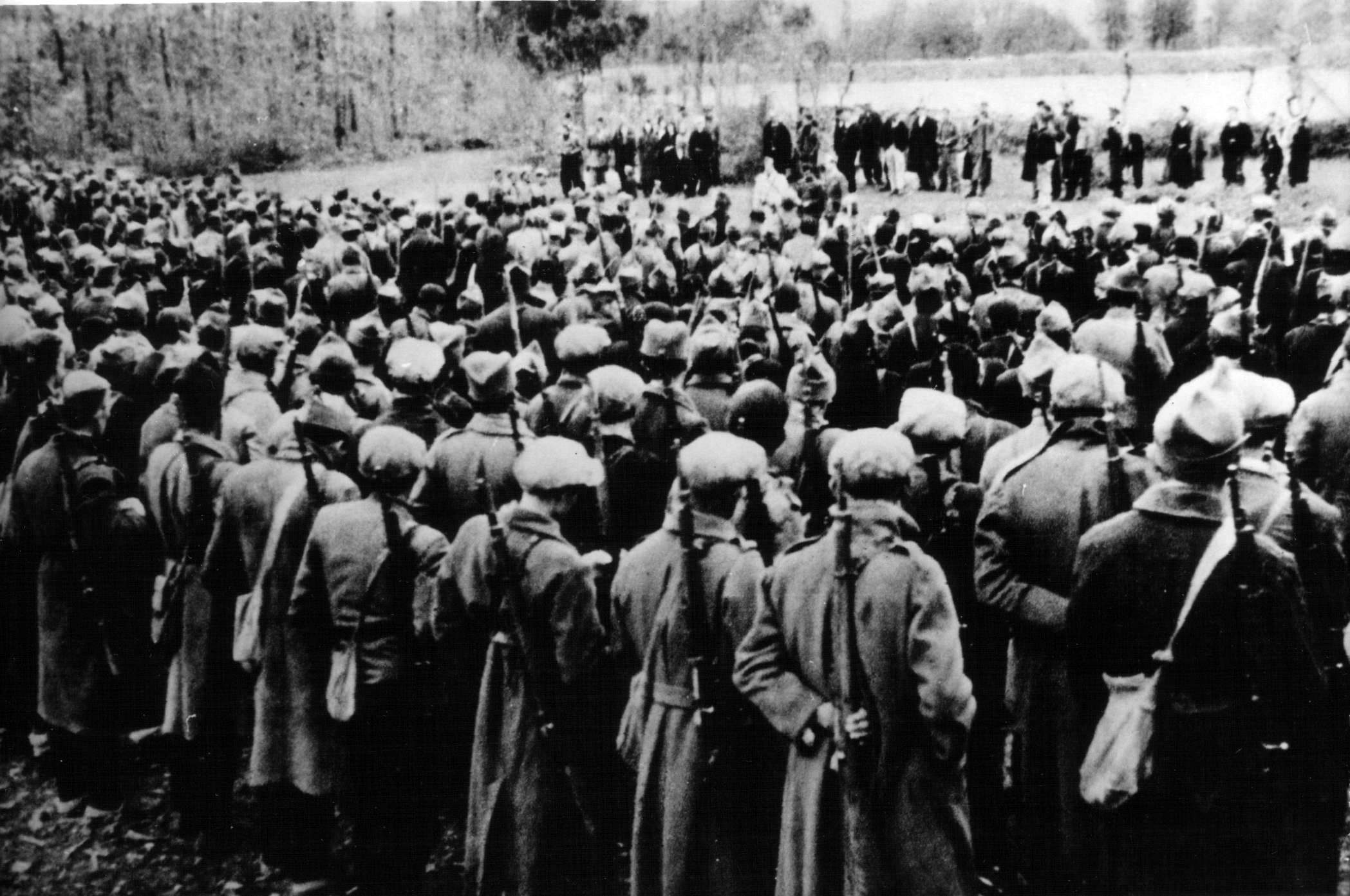 Srpski (latinica): Formiranje 3. dalmatinske udarne brigade u Vrbi, Zlopolje 17.11. 1942.